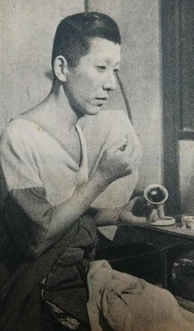 六代目中村芝翫（後の六代目中村歌右衛門）